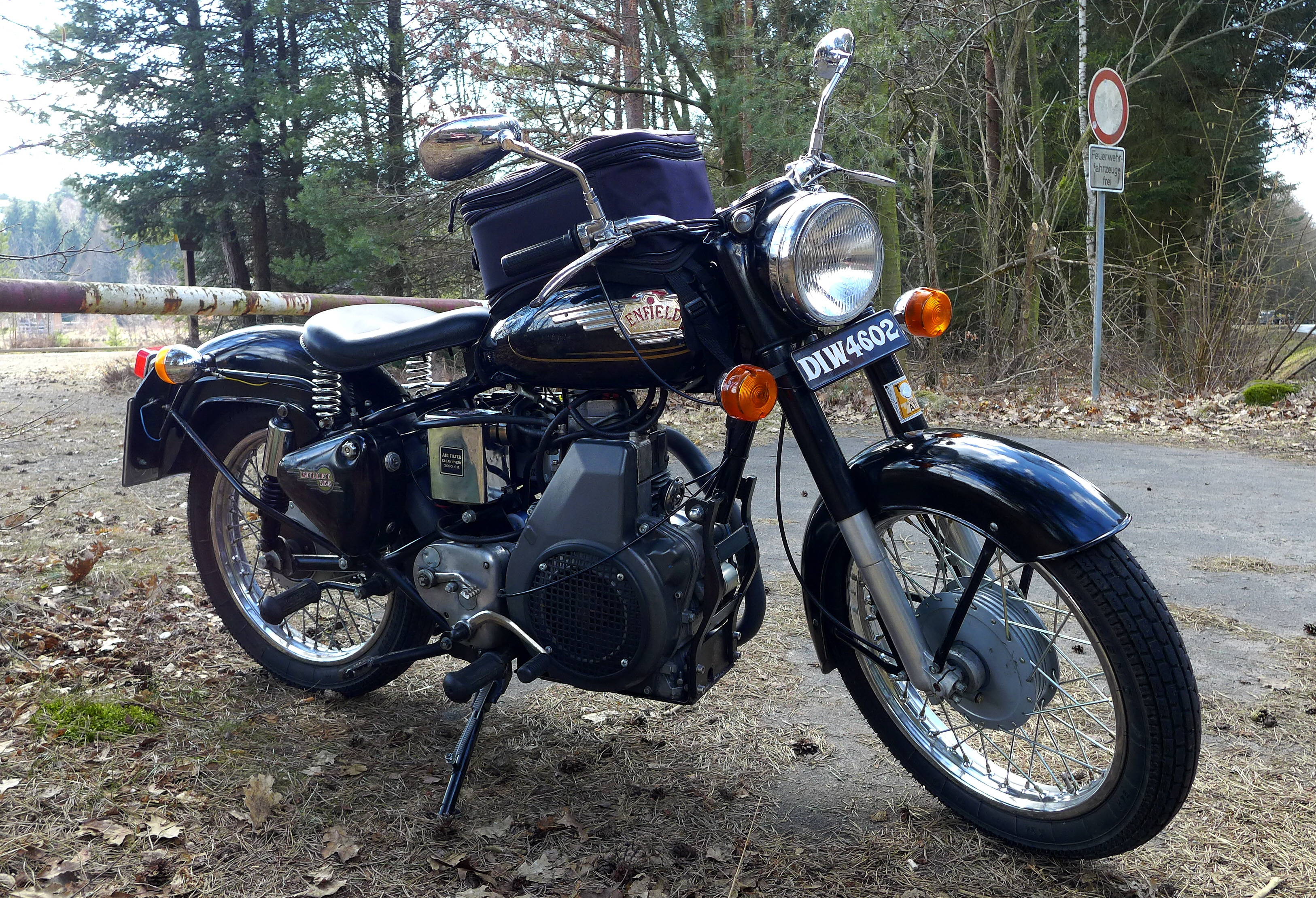 Royal Enfield Bullet 350 (Ansicht rechtsseitig), modifiziert mit Dieselmotor aus einem Rüttler (Baumaschine). Baujahr 1984, Dieselmotor 440 ccm, 11 PS. Getriebe 4-Gang, Höchstgeschwindigkeit 106 km/h, Sattel in Echtleder, Verbrauch 2,0 Liter Diesel auf 100 km. Aufnahmedatum 2013-04-07